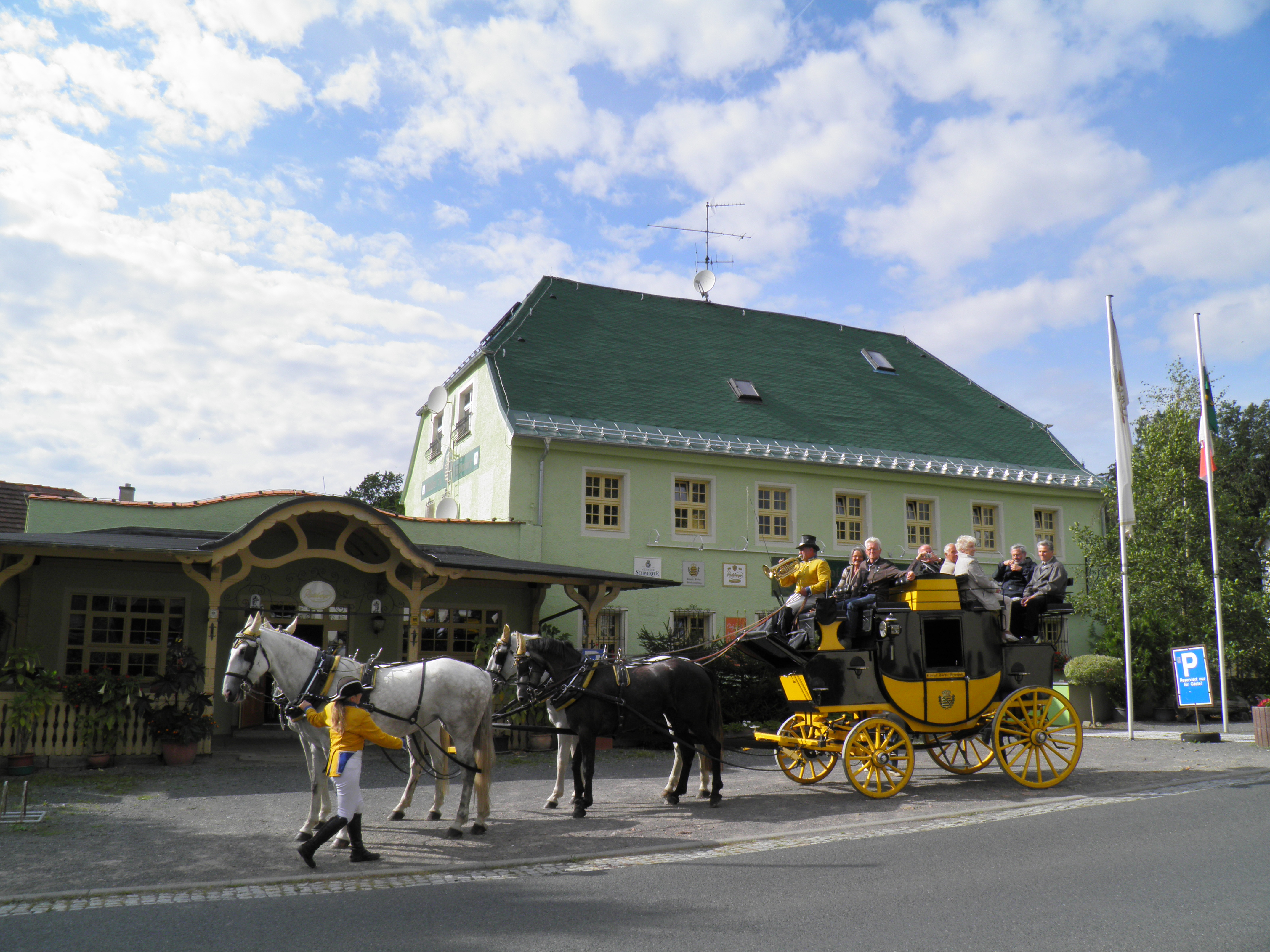 Gasthaus Waldhof zu Grillenburg mit Postkutsche